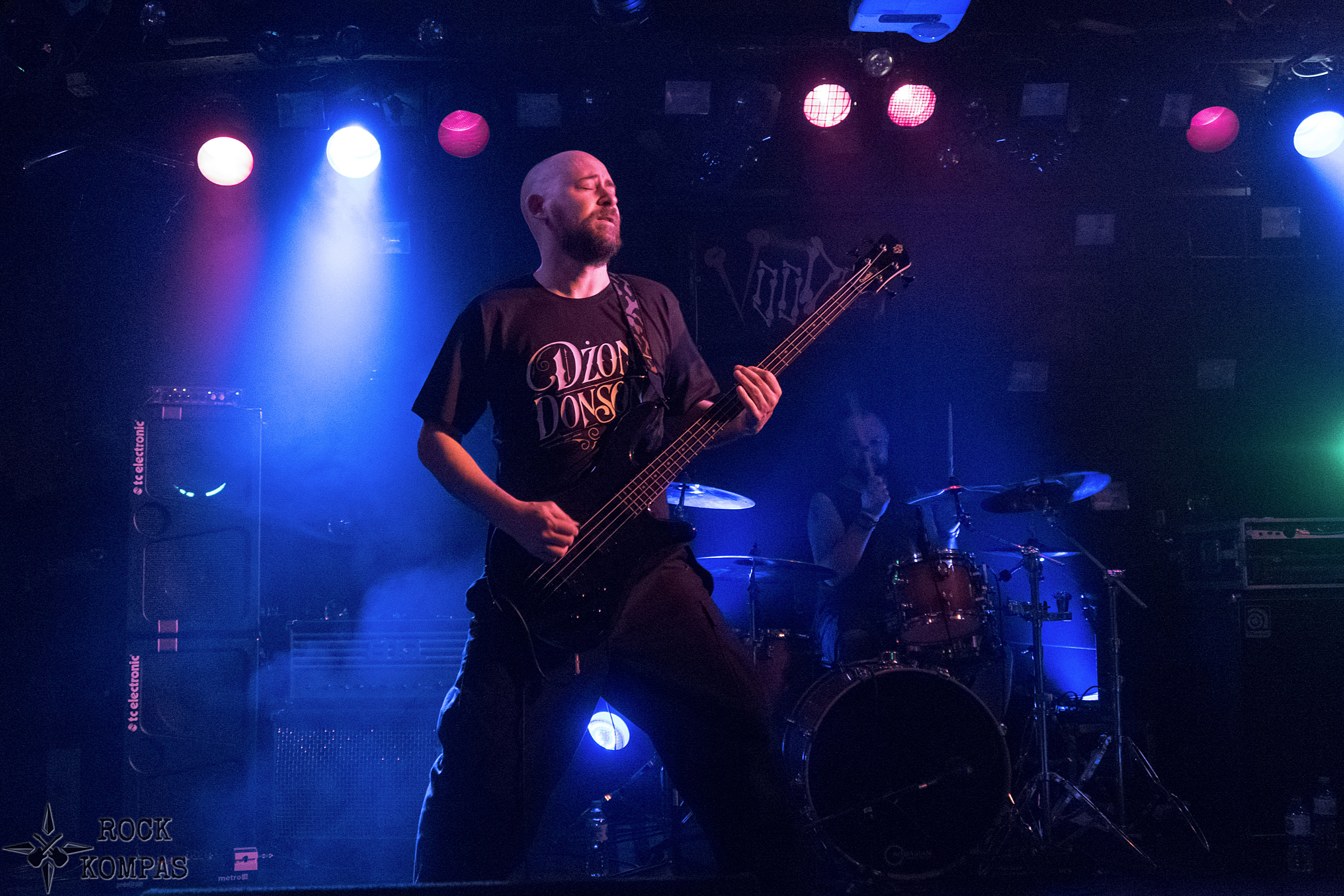 Sebastian Górski podczas występu zespołu Orbita Wiru. 2019 Warszawa, klub Voo Doo